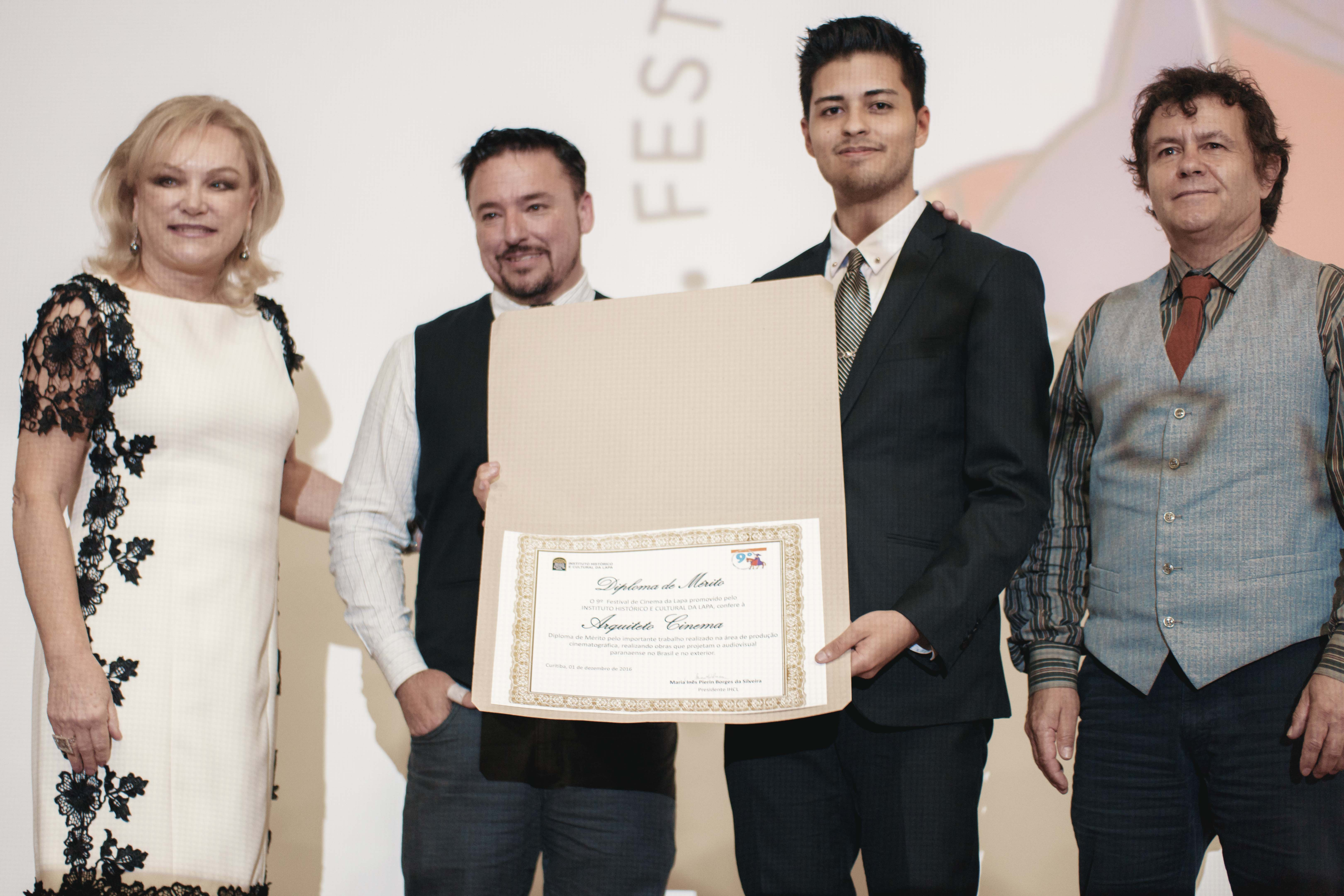 Na foto Nyck Maftum, Ruy Marques e Guata Maftum.